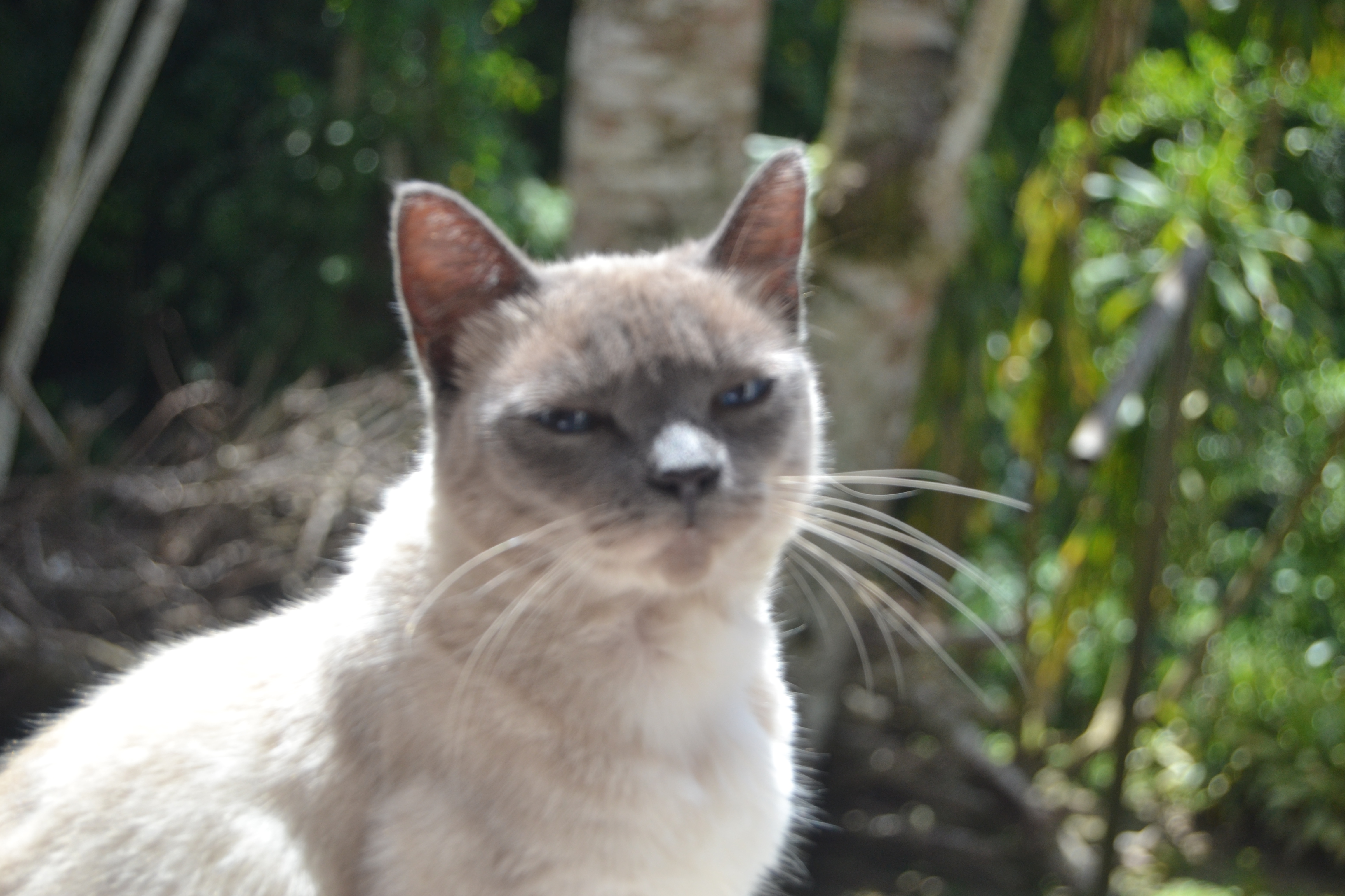 Esta es una foto de un tipico gato siames desde una ventana con vista al bosque.